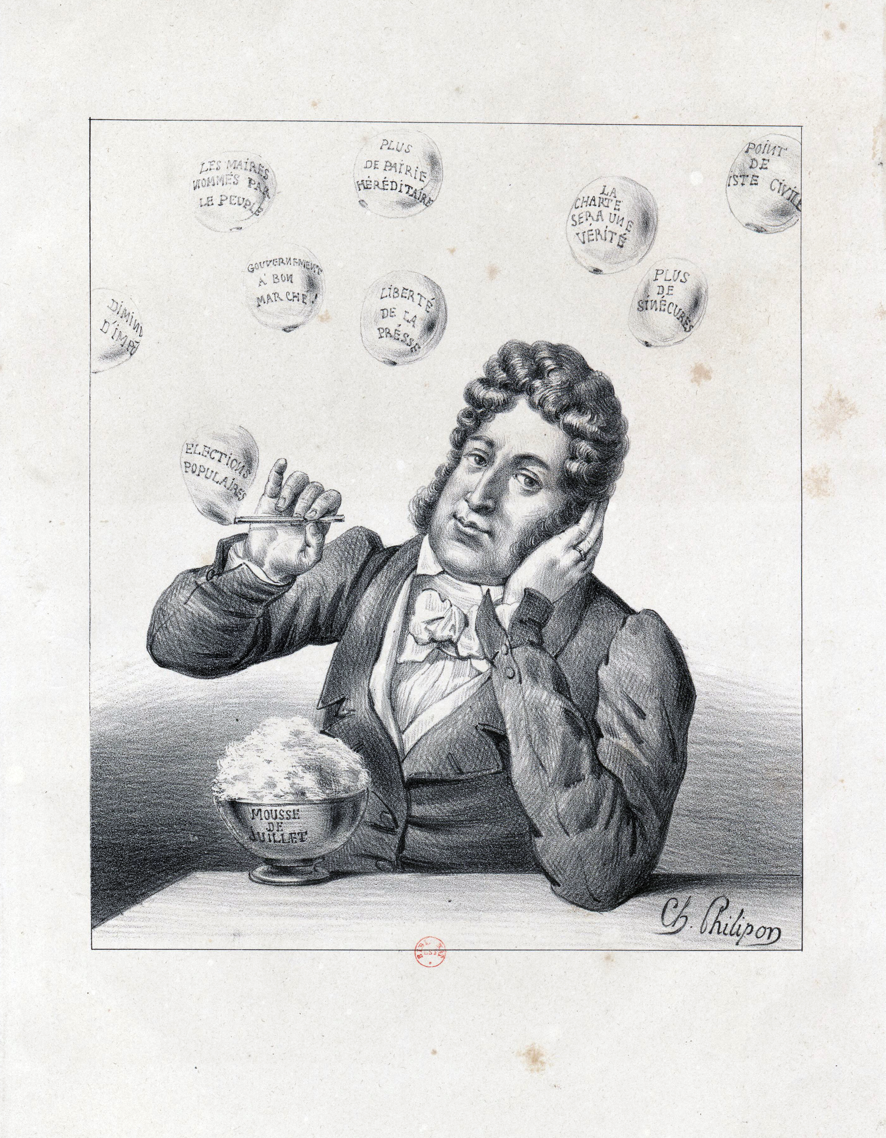 Louis-Philippe Ier (roi des Français ; 1773-1850)